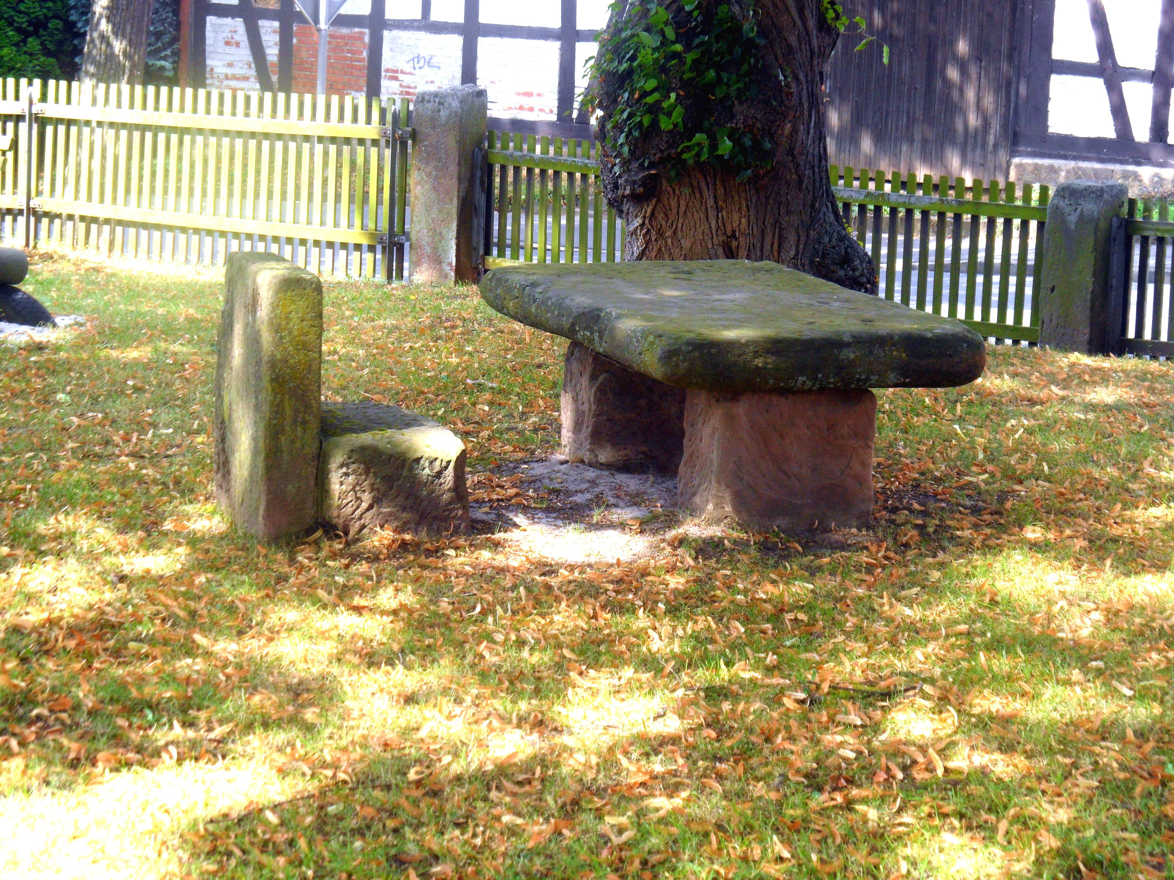 Thieplatz Stockhause mit den Wappenelementen Steintisch und Steinstuhl